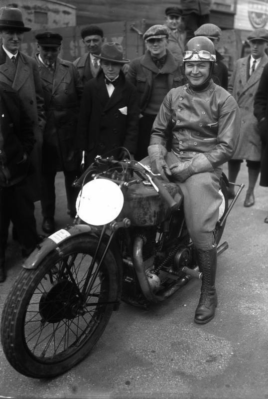 Burgaller auf Standard